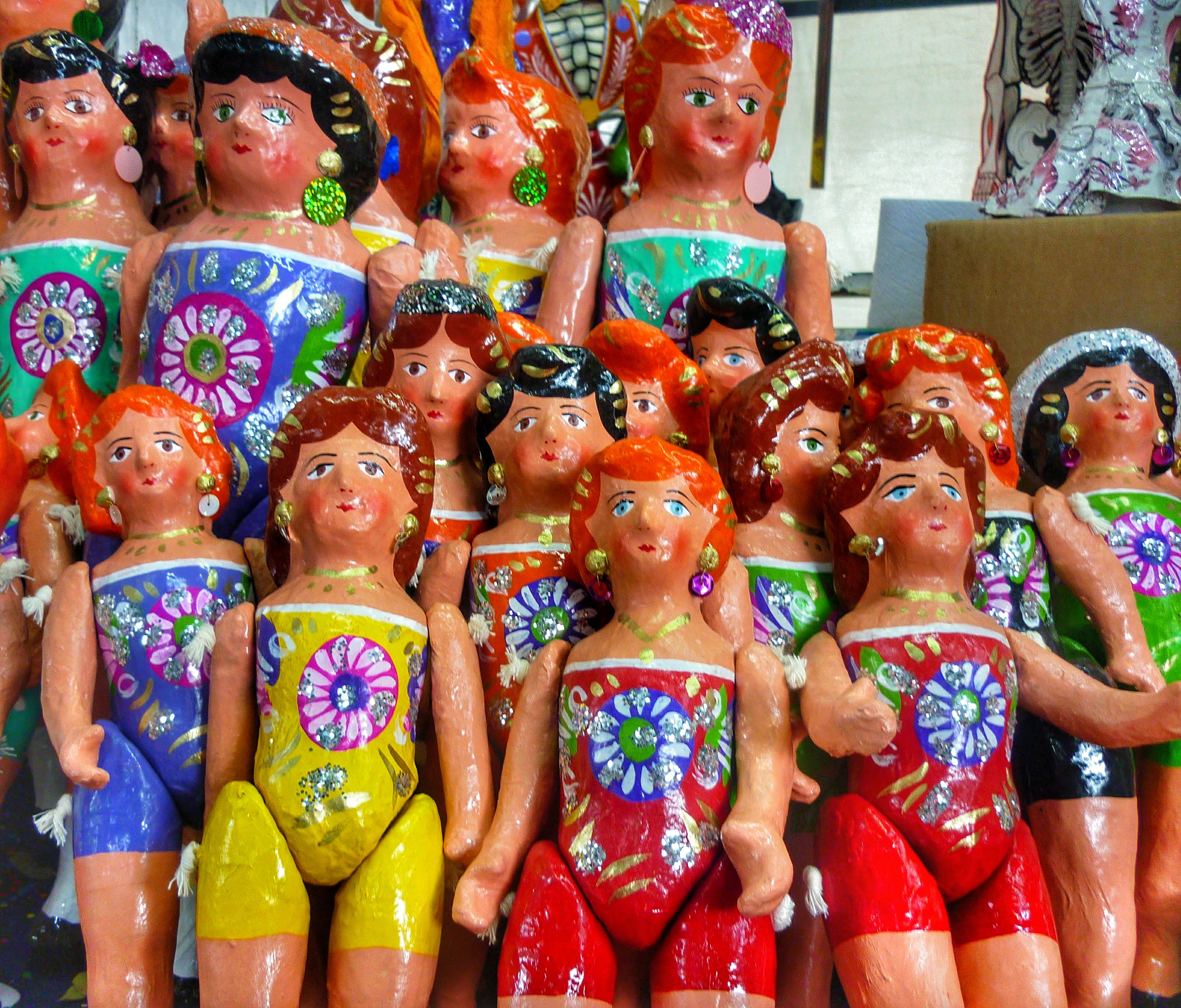 Infancia Méxicana